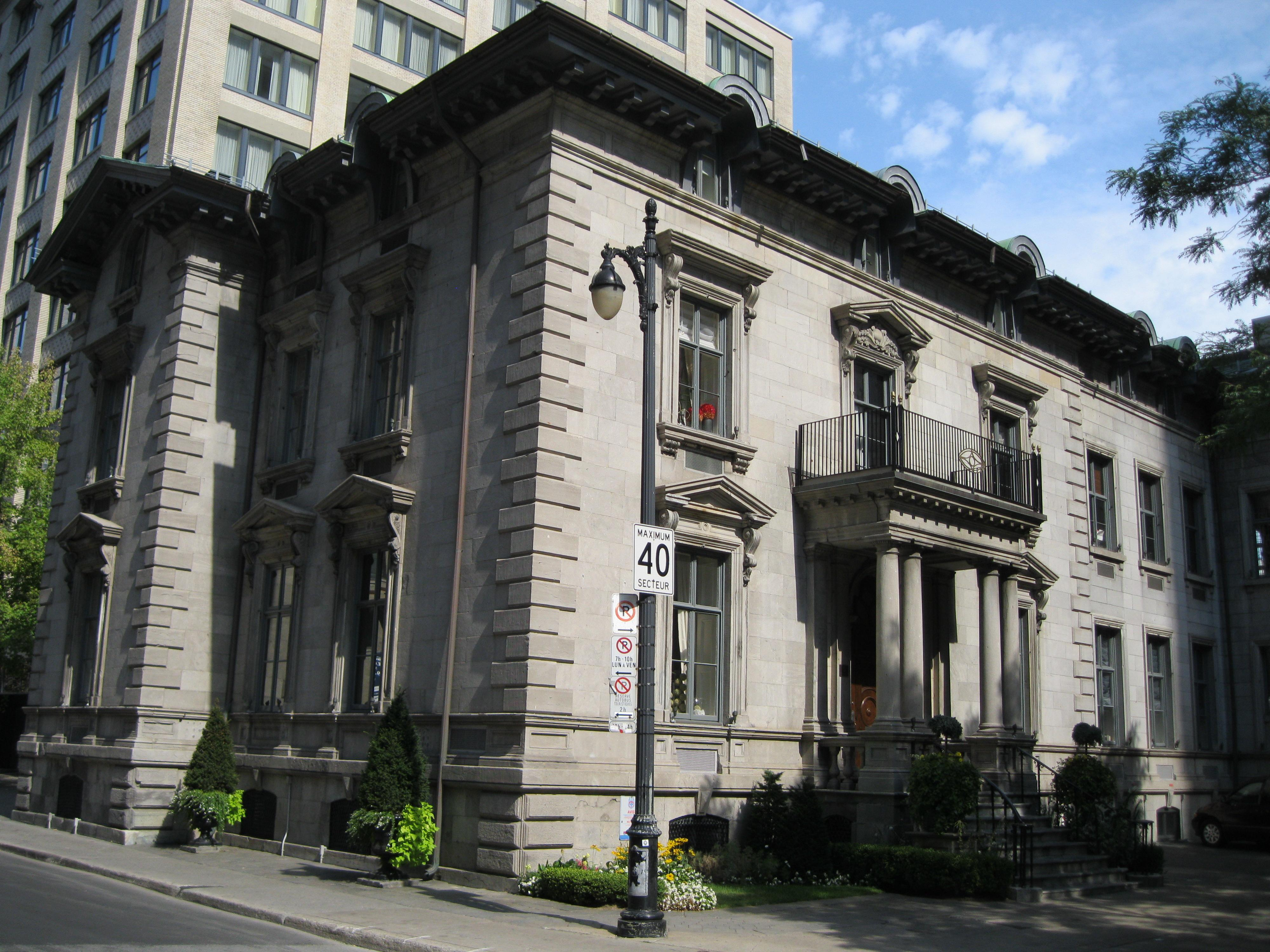 La maison William-Dow, classée monument historique, est une imposante demeure bourgeoise de style néo-Renaissance, construite en 1860 et agrandie en 1912 et en 1933. Elle est située au 1175-1183, place du Frère-André, Montréal.45.50353-73.56689